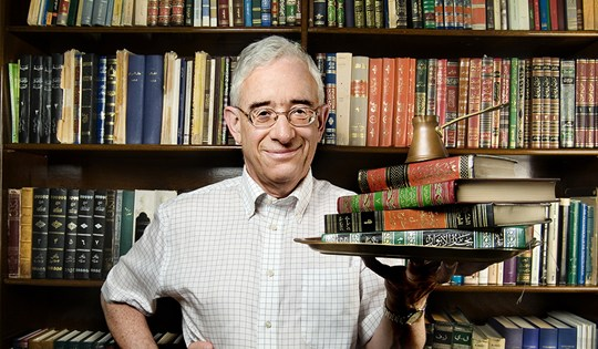 המזרחן פרופסור איתן קולברג